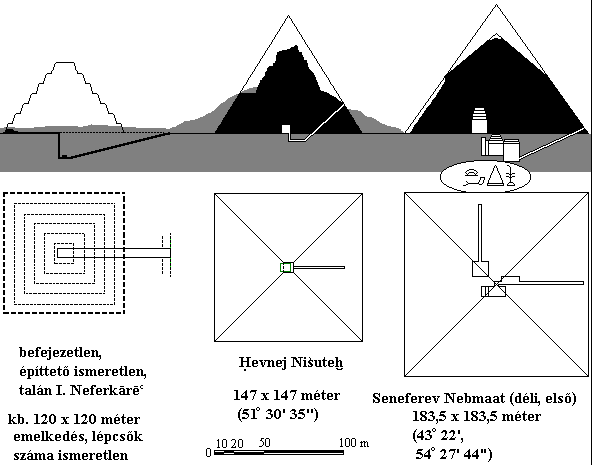 Átmeneti piramistípusok